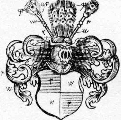 Siebmacher Wappen der mecklenburgischen Familie Wackerbarth